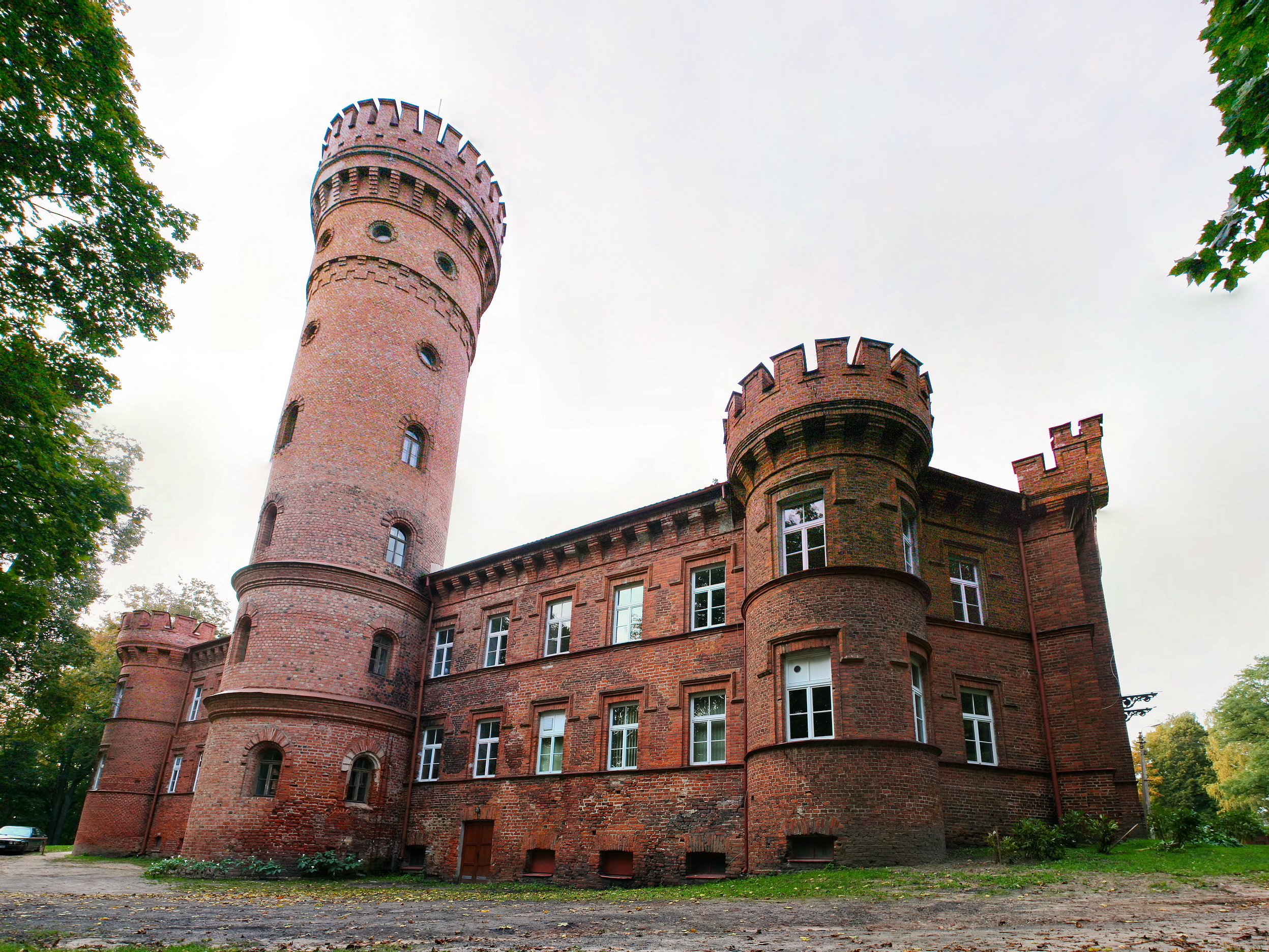 Raudonė Castle, Lithuania